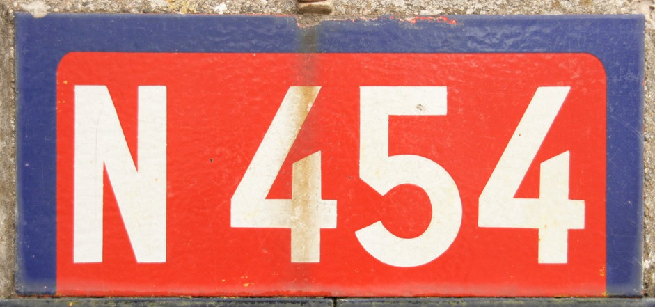 cartouche de panneau de l'ancienne nationale 454